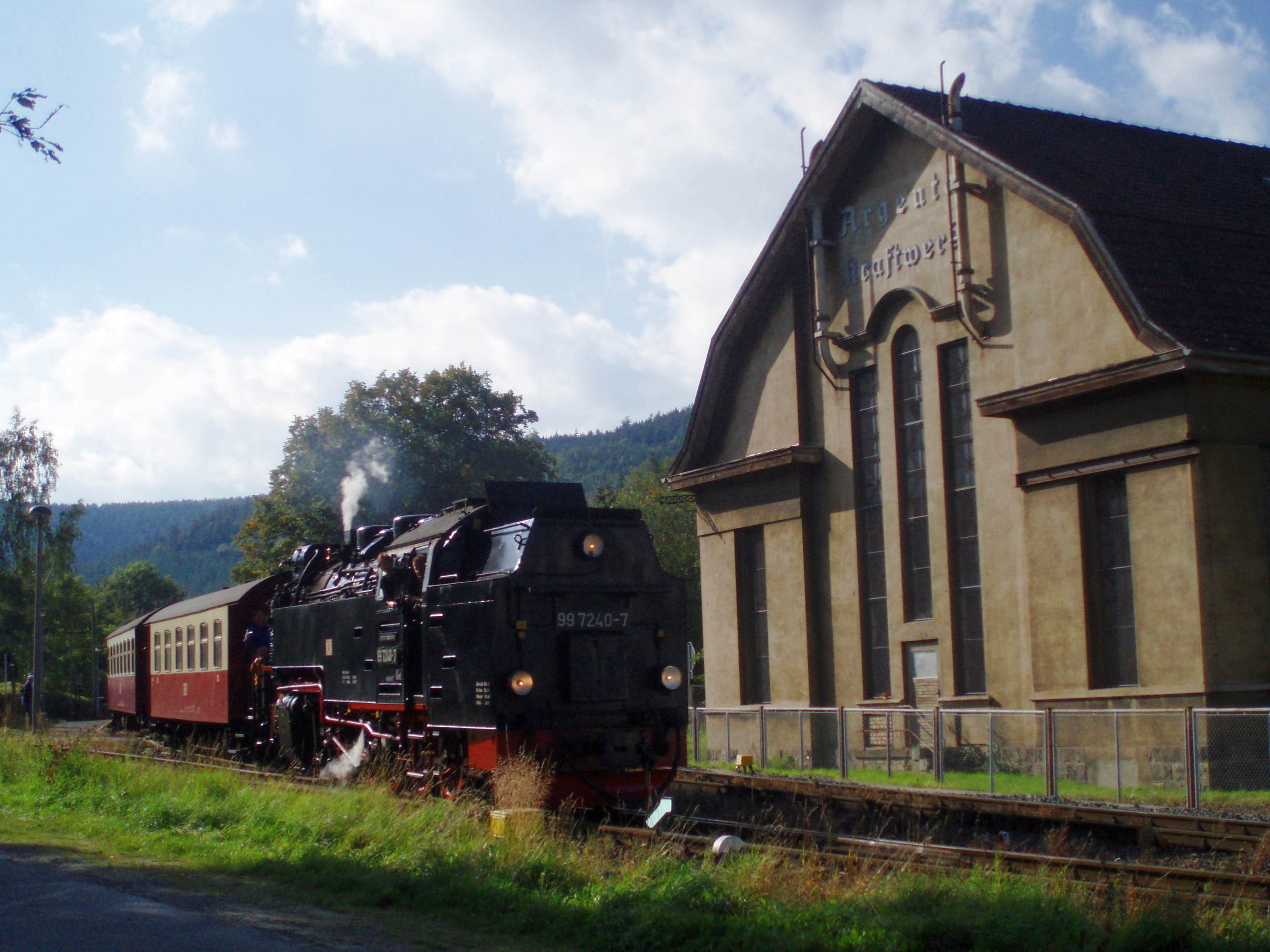 HSB beim Argenta-Kraftwerk